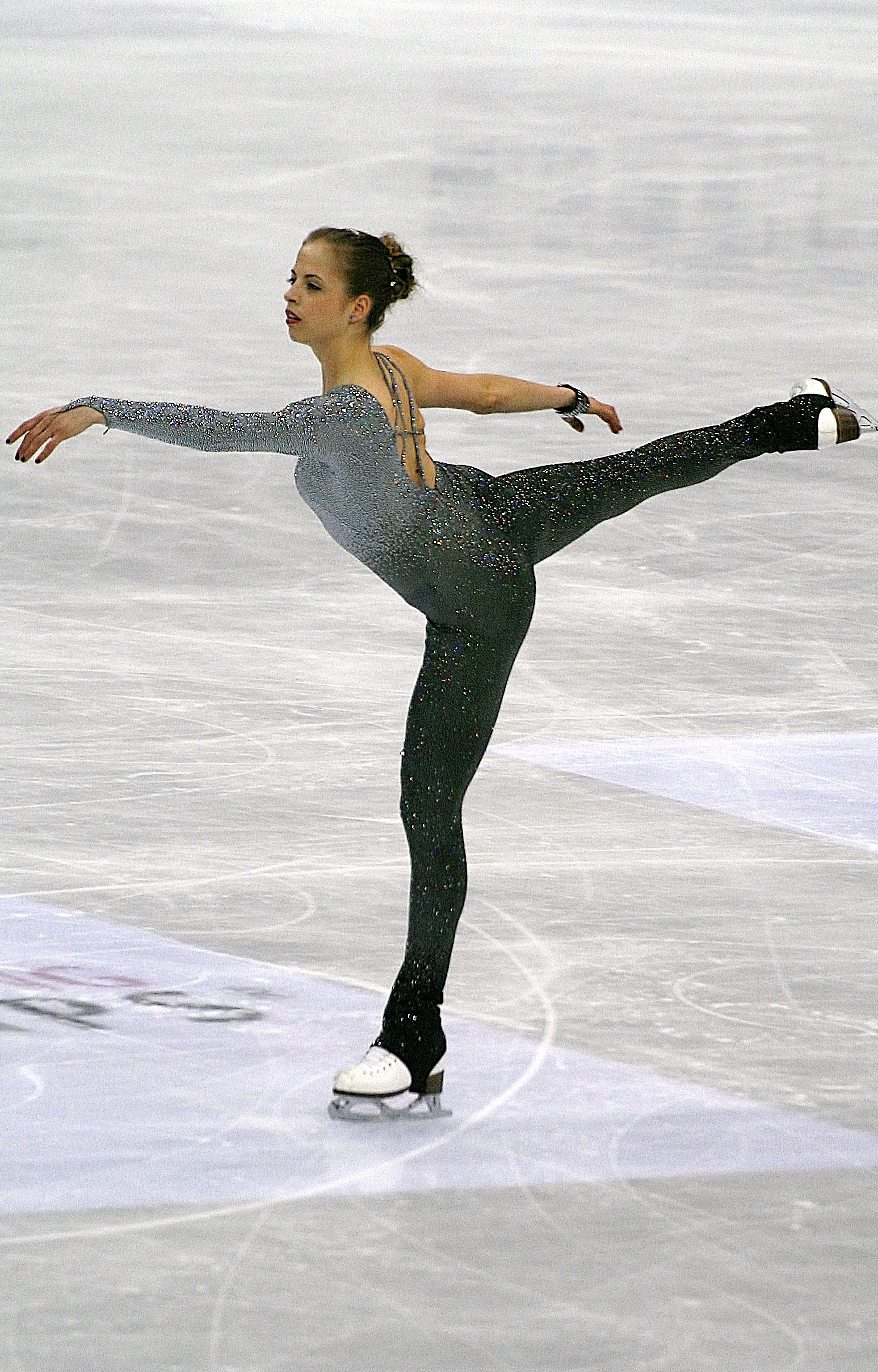 Каролина Костнер (Италия) на чемпионате мира по фигурному катанию 2012